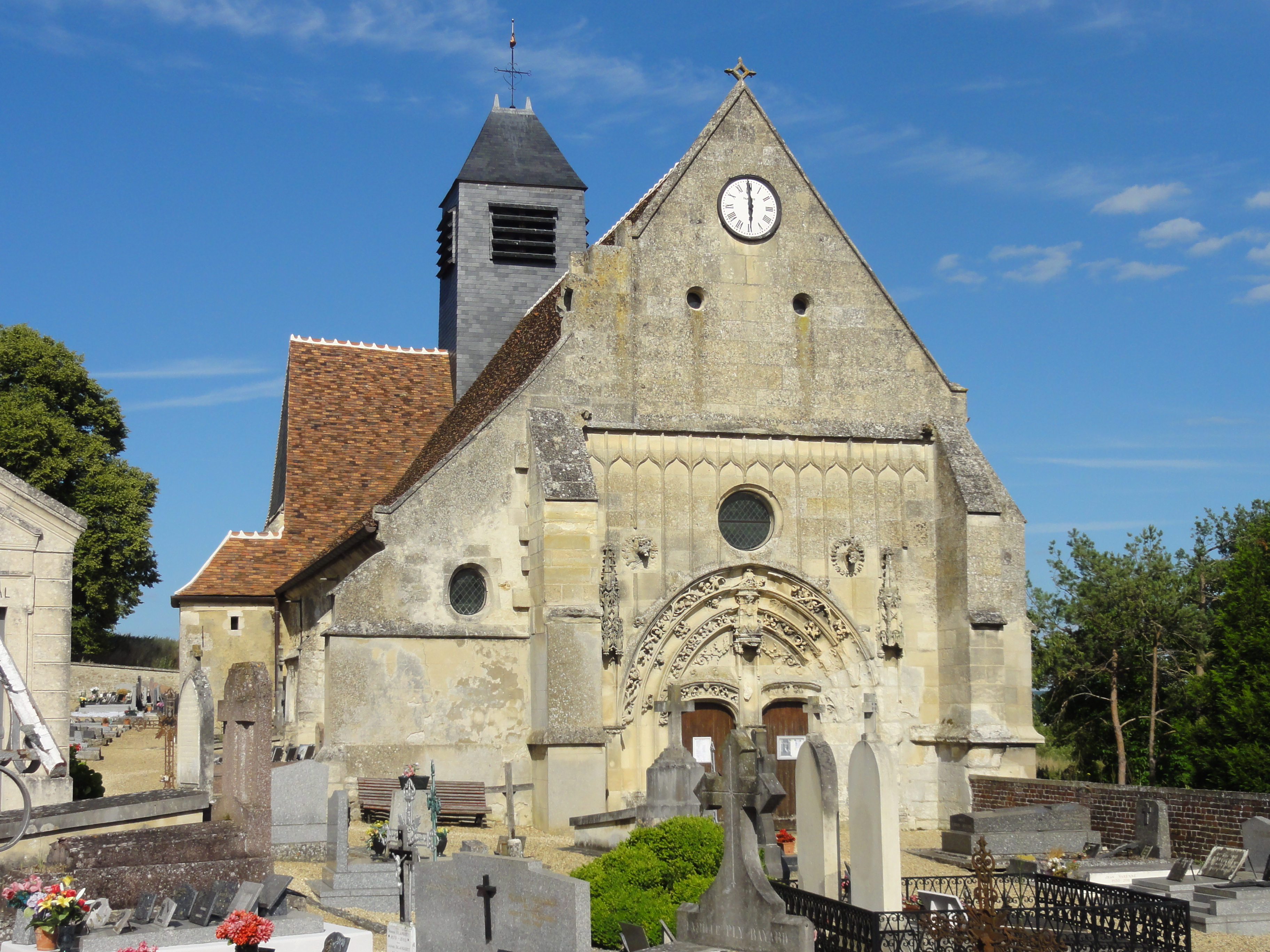 Église Saint-Wandrille de Rivecourt (voir titre).